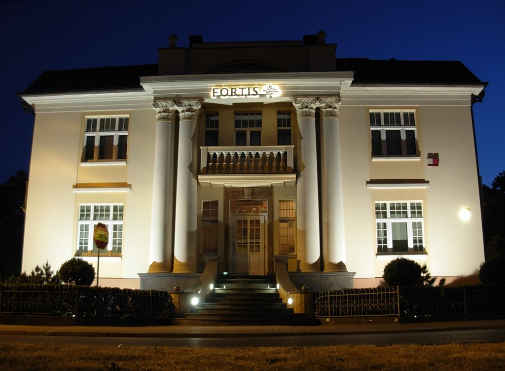 Aleja Ossolińskich 25 w Bydgoszczy